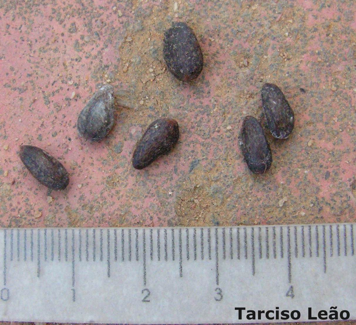 Parkia pendula, visgueiro